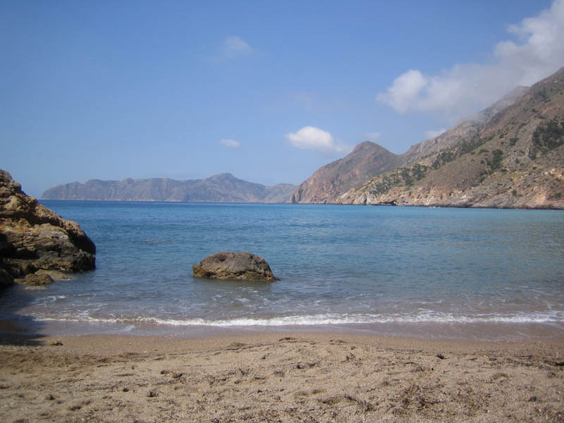 Playa del Portús en Cartagena. Al fondo Cabo Tiñoso. Espacio protegido de La Muela-Cabo Tiñoso.